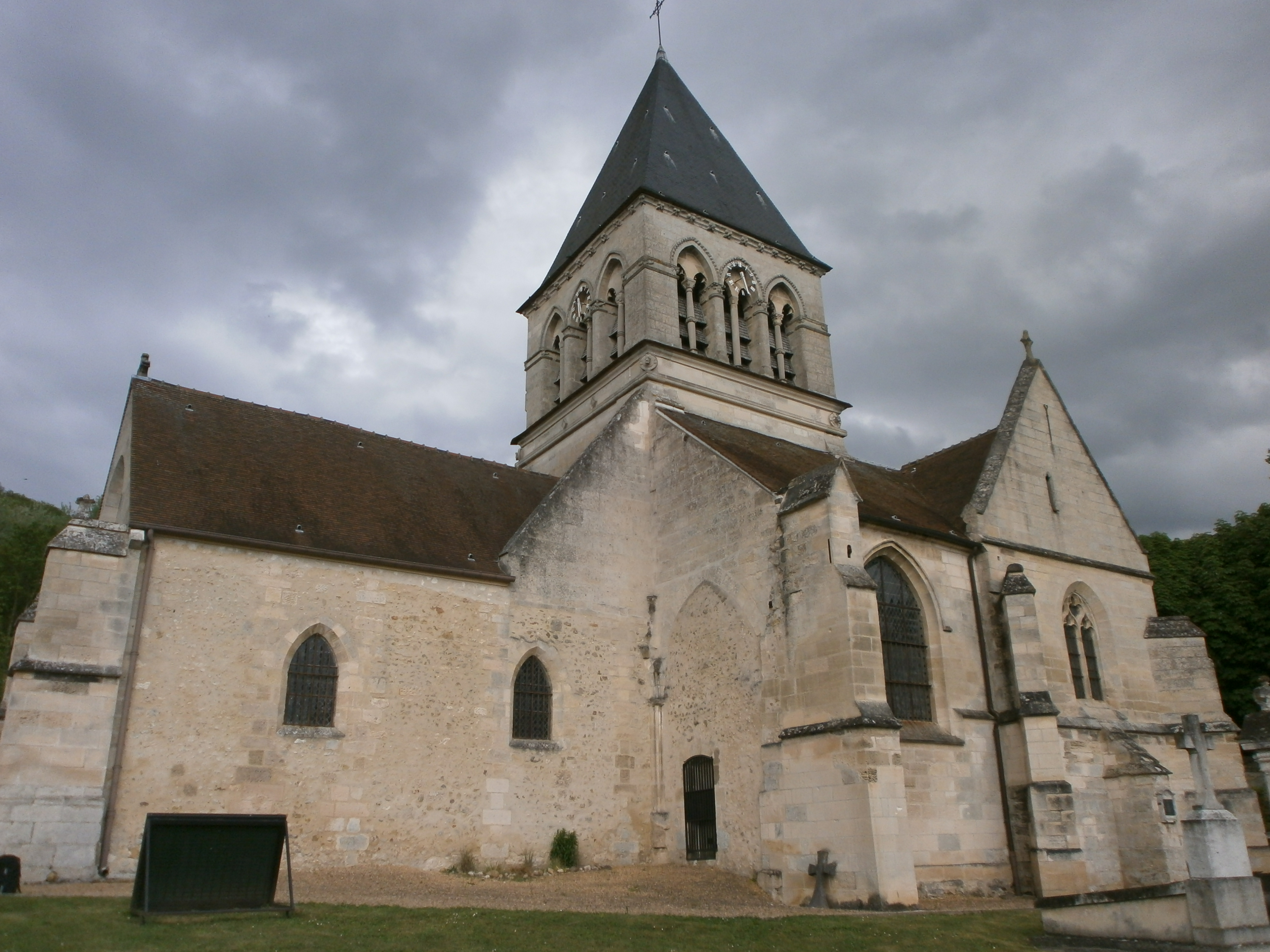 Eglise de Clairoix